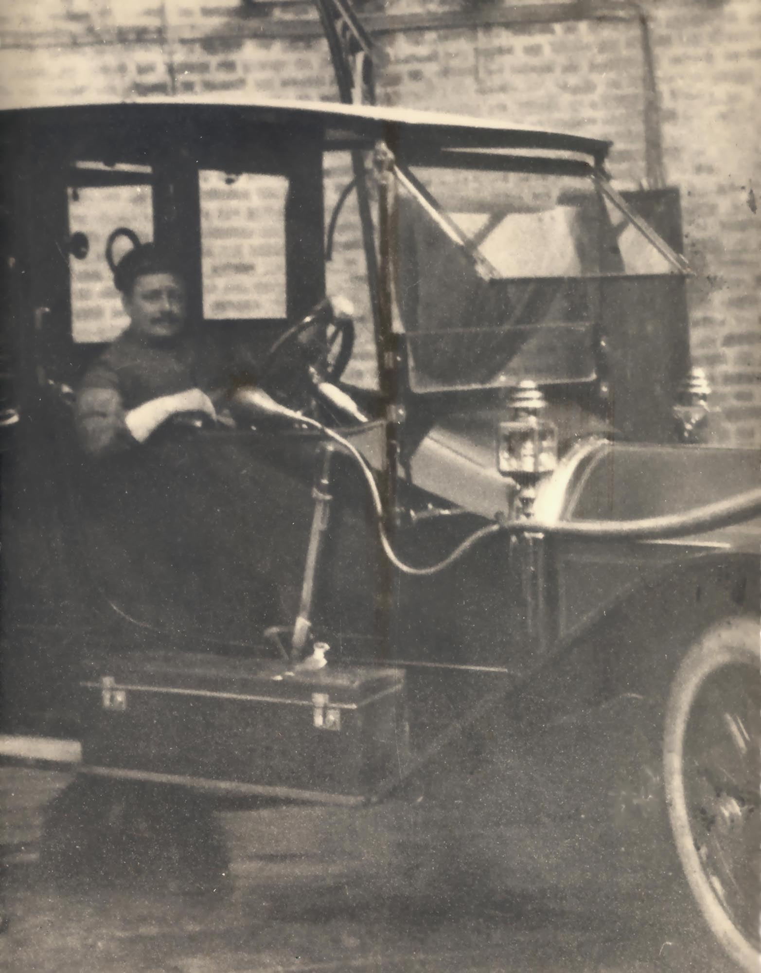 Chauffeur Marcello Nicola, Italia, 1910 circa. Album di famiglia.